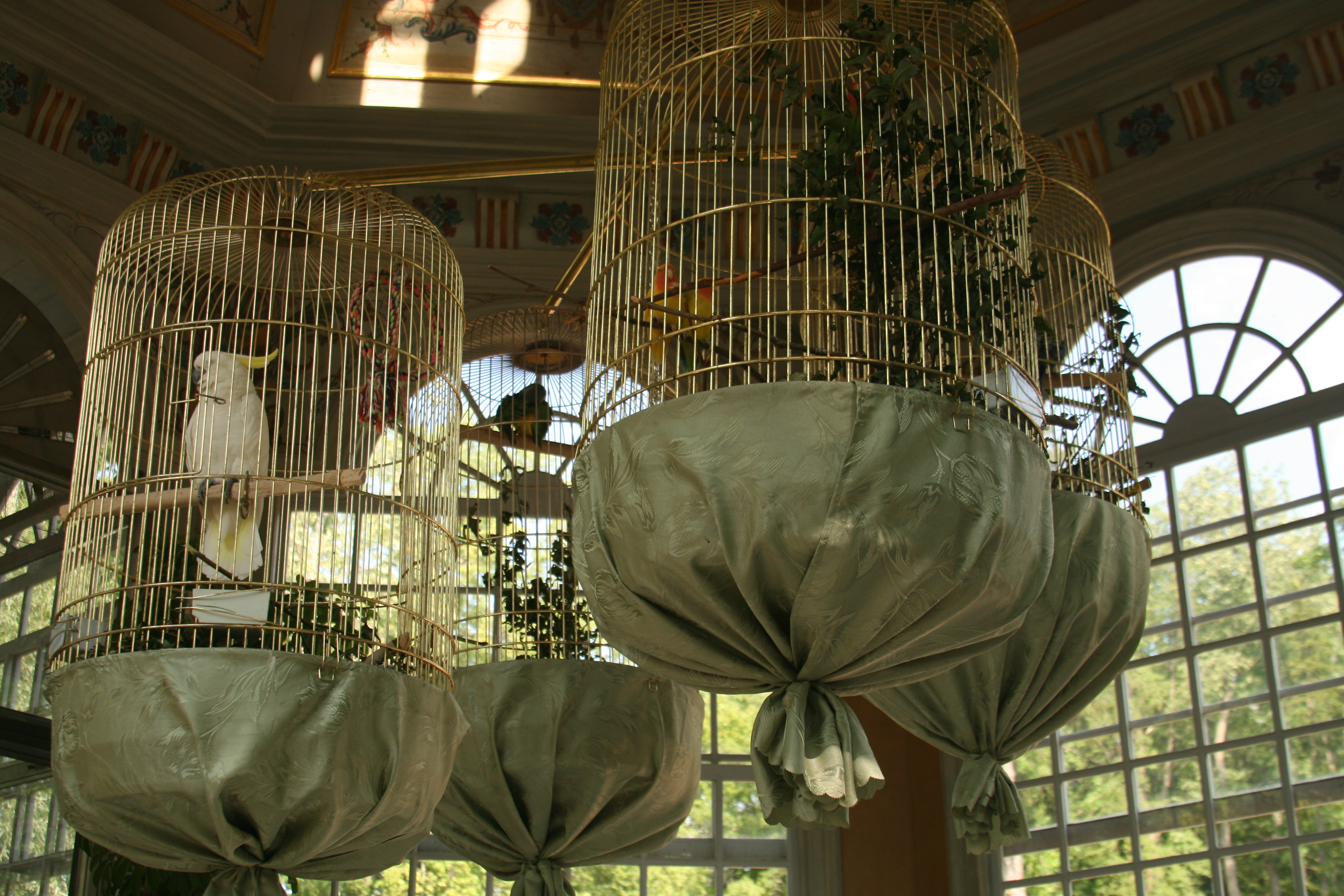 Вольеры (два): у восточного и западного берегов Менажерийного пруда, Петергоф, Петродворцовый район, Санкт-Петербург